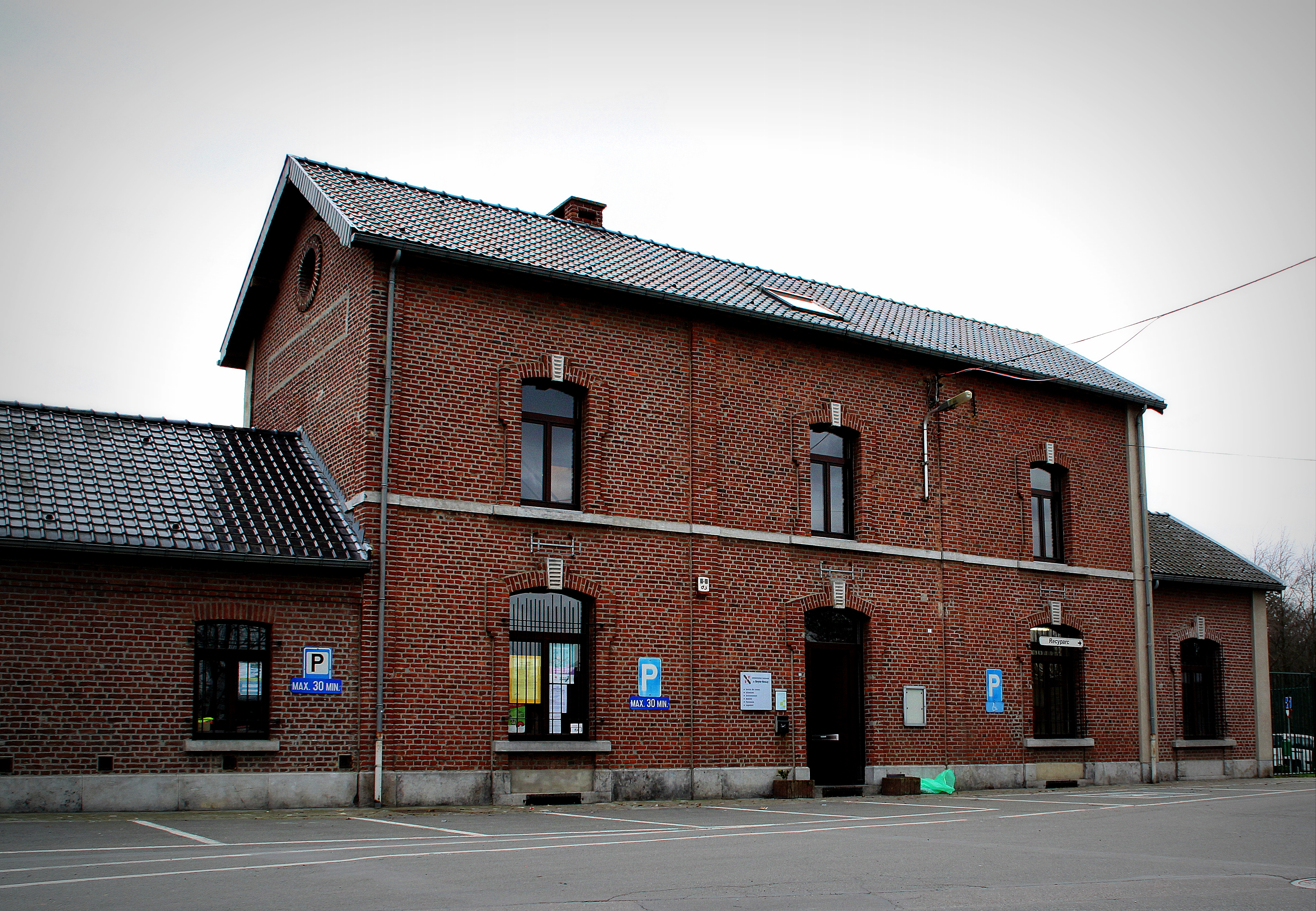 D'Gare vu Beyne (2014)